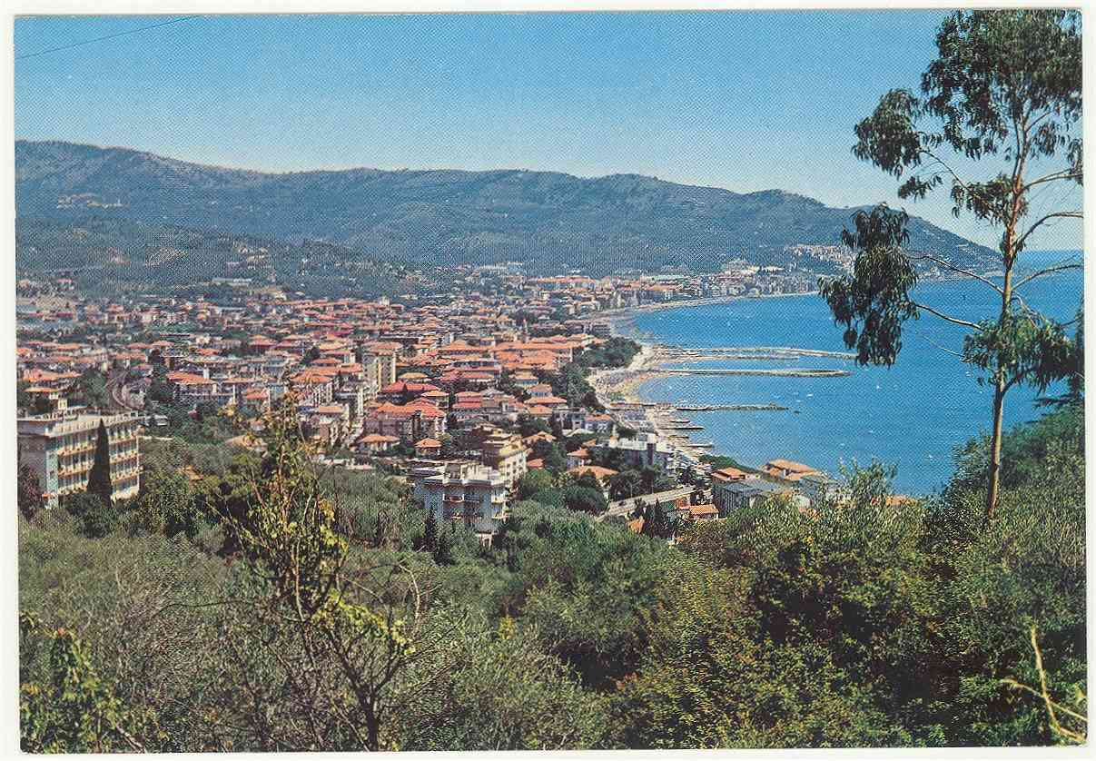 IM Riviera dei Fiori - Diano Marina - panorama da Ponente